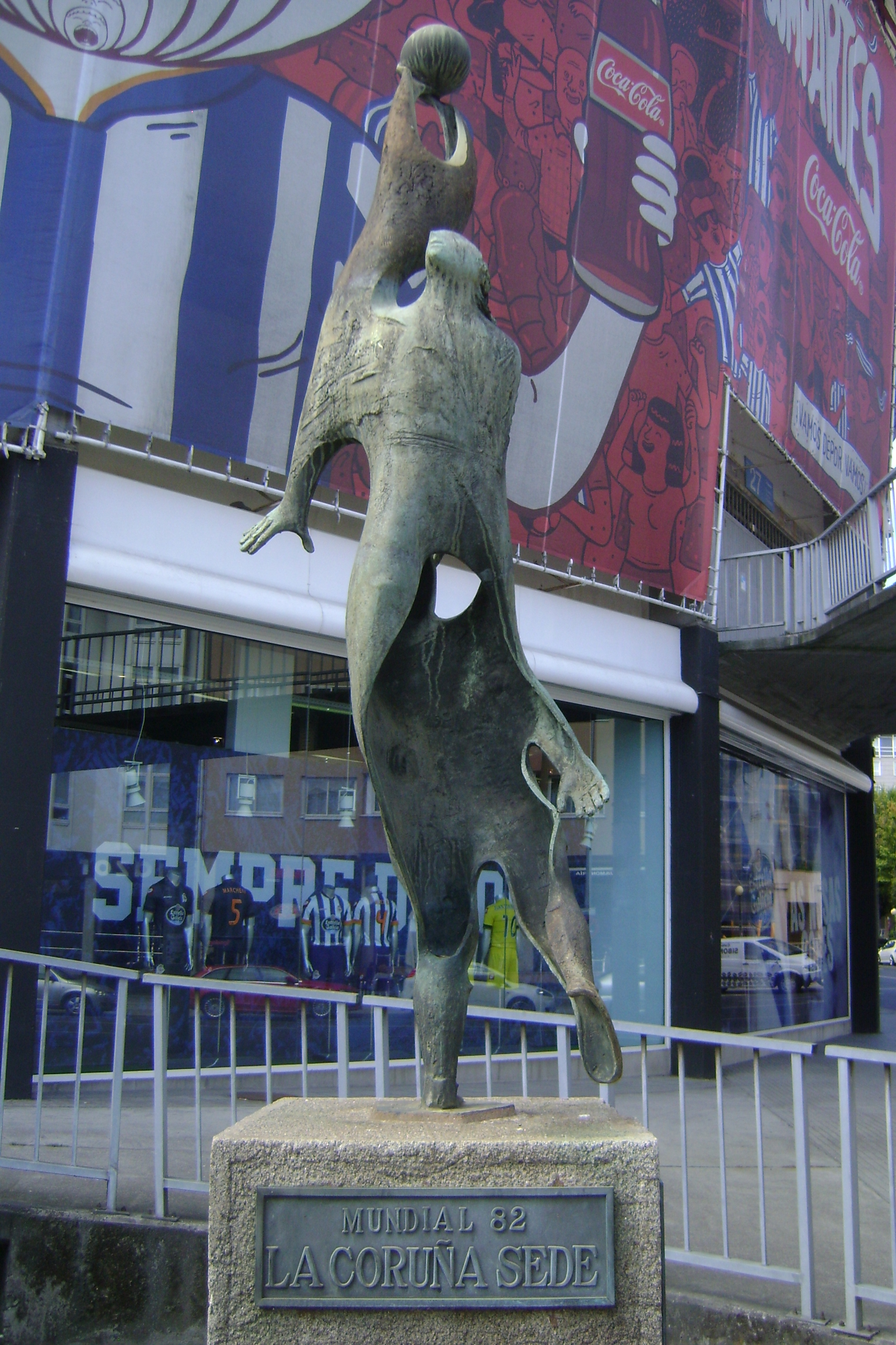 Estatua del Mundial de 1982 situada en el Estadio de Riazor, La Coruña, España.